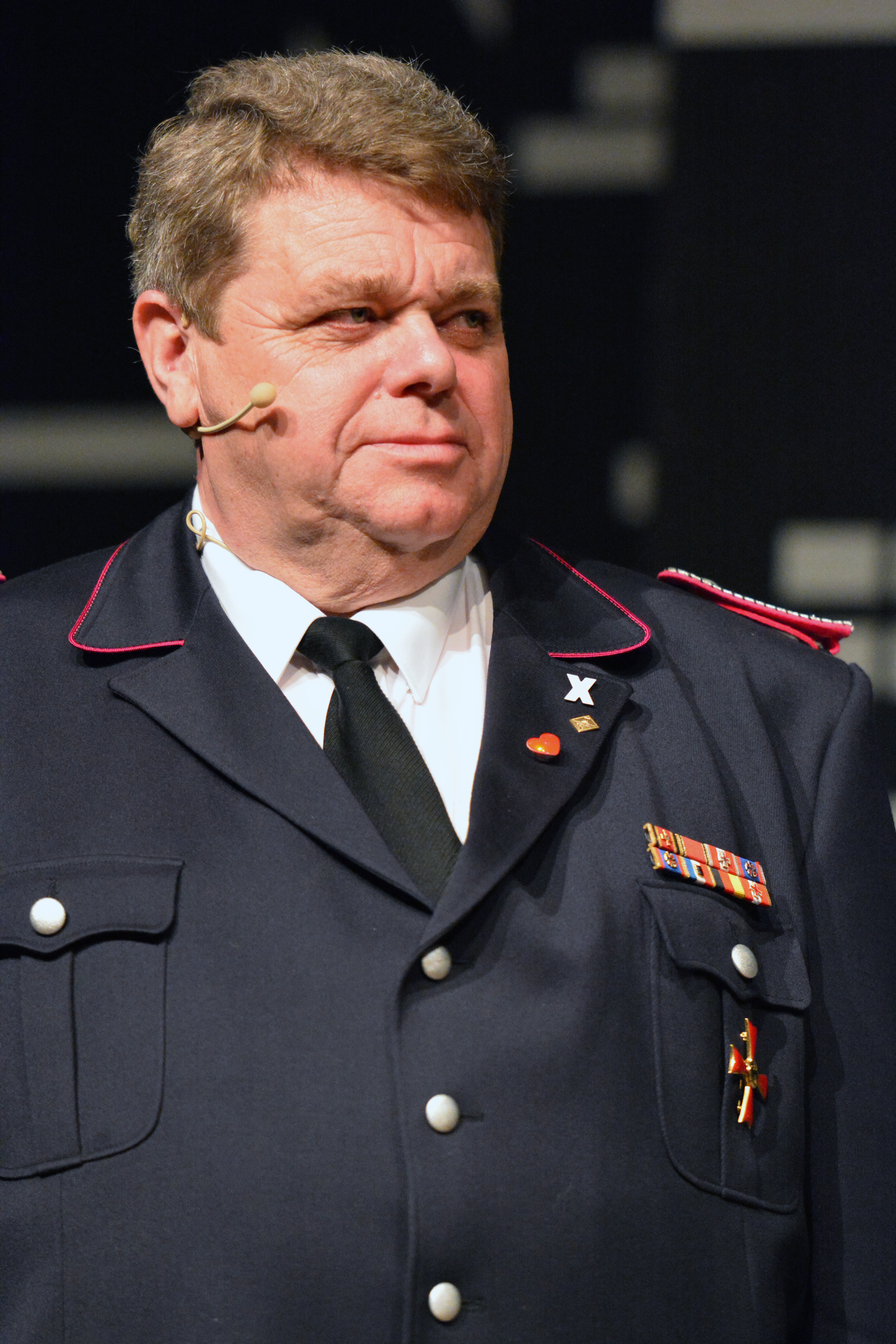 Der Initiator und Träger des Bundesverdienstkreuz 1. Klasse des Verdienstordens der Bundesrepublik Deutschland Rolf Heidenberger bei Appen musiziert 2014